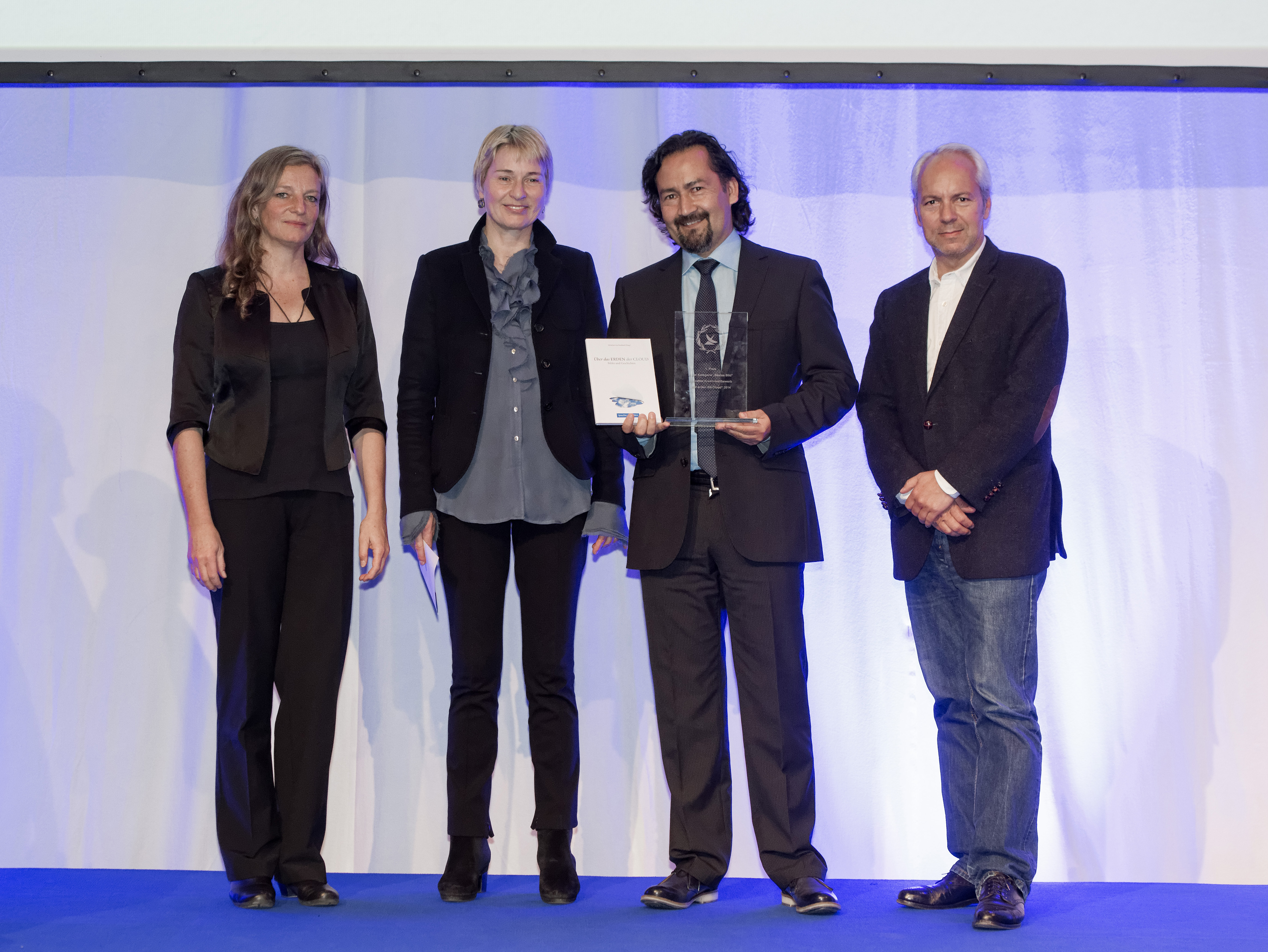 SpaceNet Award 2014: (vlnr) Jury-Mitglieder Gabriele Lechner und Simone Nickl mit dem Preisträger in der Kategorie Bild - Alejandro Pérez Ponce / 13.05.2014 / Foto: SpaceNet Award / Stephan Görlich